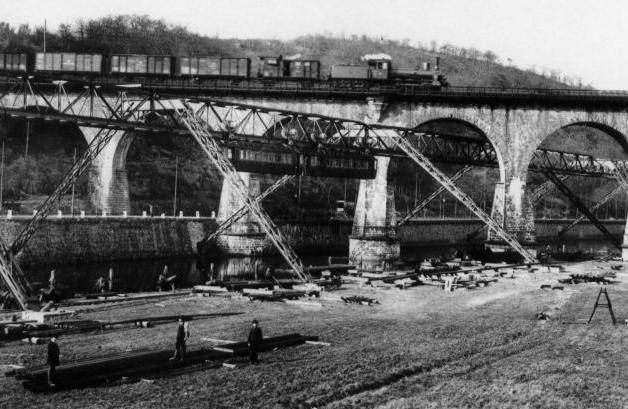 Bau der Wuppertaler Schwebebahn bei der Sonnborner Eisenbahnbrücke From image: Die beiden Probewagen vor der Eisenbahnbrucke am Zoo